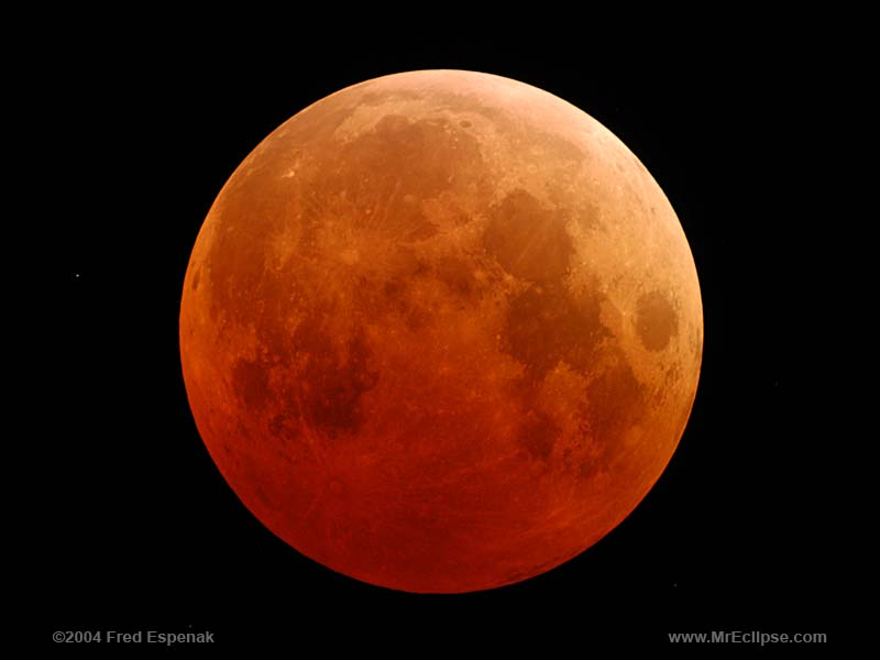 Ngjyra e kuqe e Hënës